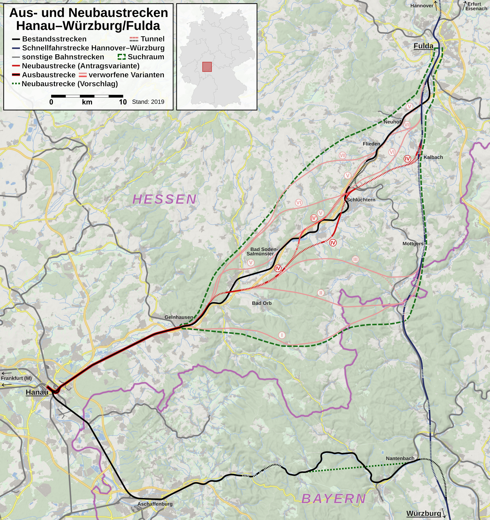 Karte des Bauprojekts Hanau–Würzburg/Fulda. Stand 2019 umfasst das Projekt den viergleisigen Ausbau der Strecke Hanau–Gelnhausen sowie eine Neubaustrecke Gelnhausen–Fulda. Für die Neubaustrecke wurden mehrere Trassenvarianten geprüft, von denen Variante IV mit Ostumfahrung des Kinzigstausees favorisiert wird. Die Variante mit Querung des Kinzigstausees (IV') wurde aus raumordnerischen und Lärmschutzgründen verworfen. This map may be incomplete, and may contain errors. Don't rely solely on it for navigation.